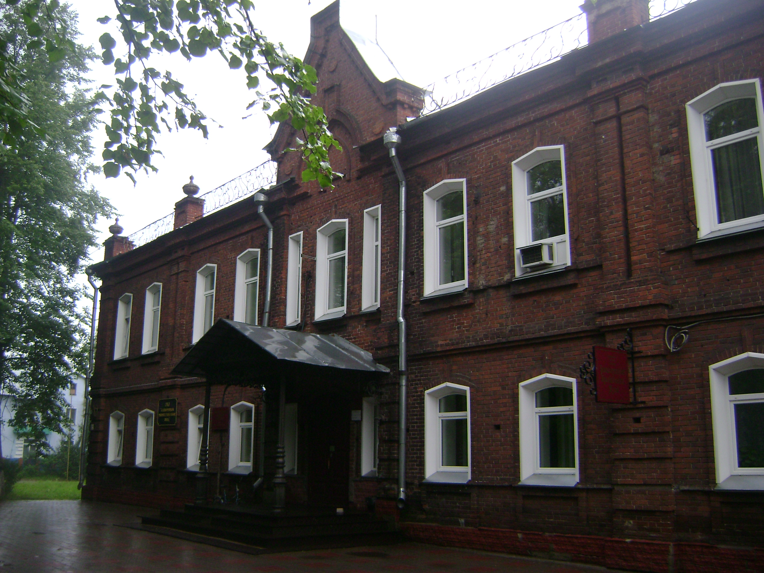 Старинное здание заводоуправления Белохолуницкого железоделательного завода. Построено в 1893.